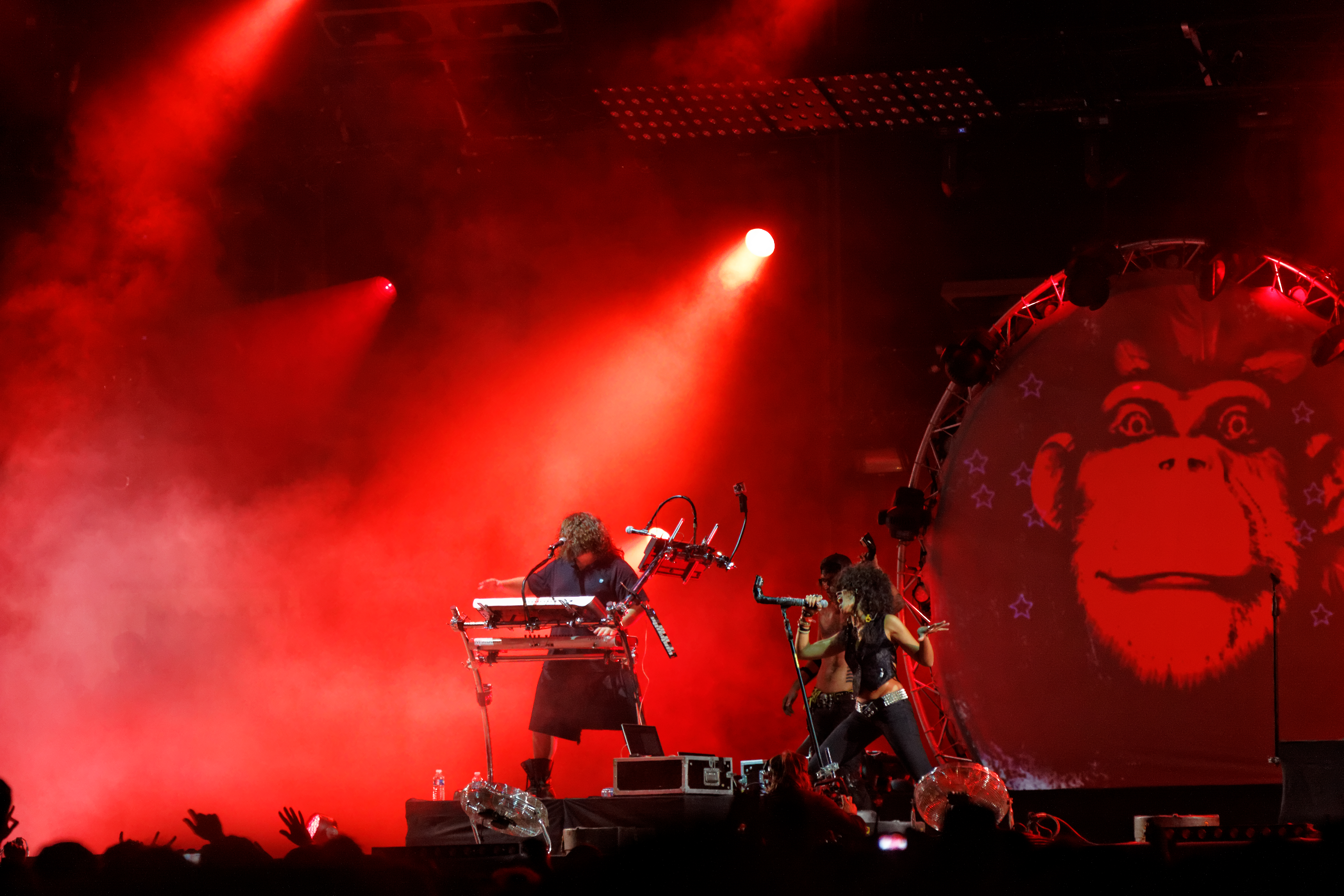 Shaka Ponk en concert sur la grande scène lors de la fête de l'Humanité 2012.